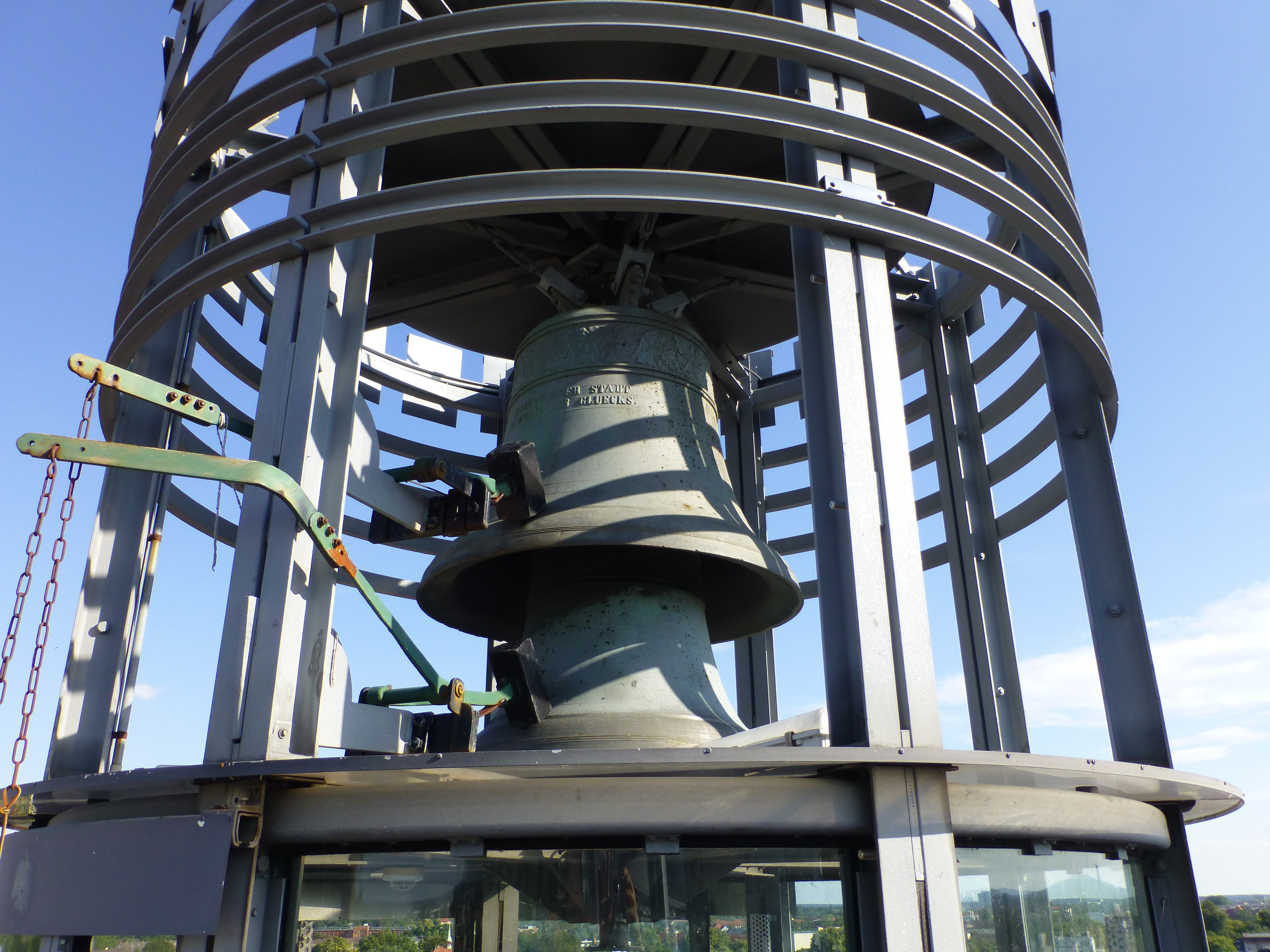 Spremberger Turm; Glockenstuhl oberhalb der Aussichtsplattform